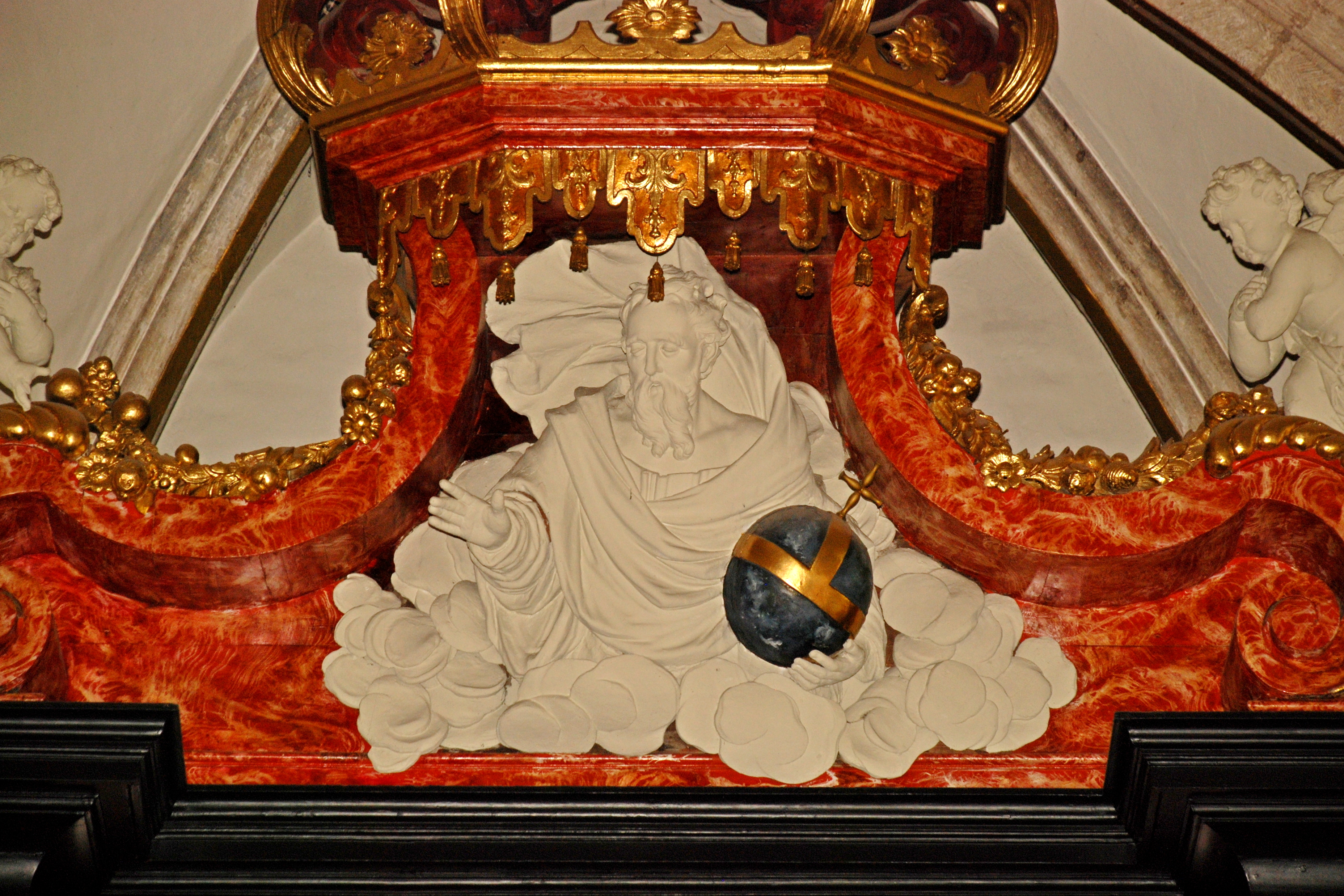 België - Vlaams Brabant - Asse - Sint-Martinuskerk